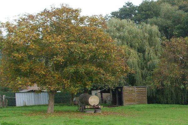 Ländliche Gegend in Wegberg-Broich